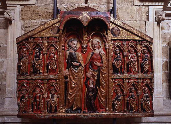 Retablo de San Marcelo, del s. XIII, con Marcelo, Nonia y sus doce hijos a los lados. Museo de León